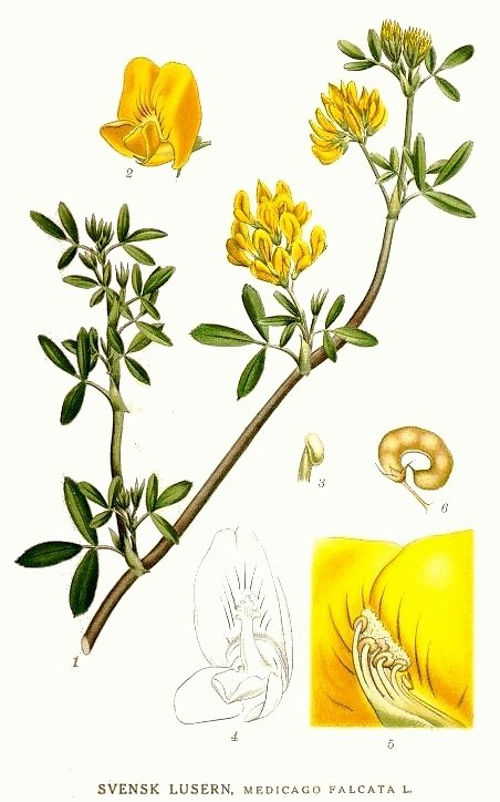 Medicago sativa subsp. falcata (L.) Arcang., syn. Medicago falcata L. Original Description Svensk Lusern, Medicago falcata L.